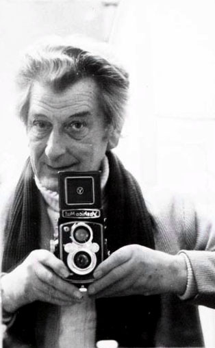 Zelfportret van Zaanse fotograaf Wim Krijt